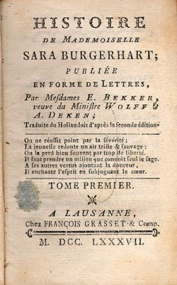 Histoire de Mademoiselle Sara Burgerhart ; Publiée en forme de lettres, Par Mesdames E. Bekker, veuve du Ministre Wolff & A. Deken ; Traduite du Hollandais d'après la seconde édition Page de titre du tome premier Publiée à Lausanne, chez François Grasset & Comp., M. DCC. LXXXVII. (1787)